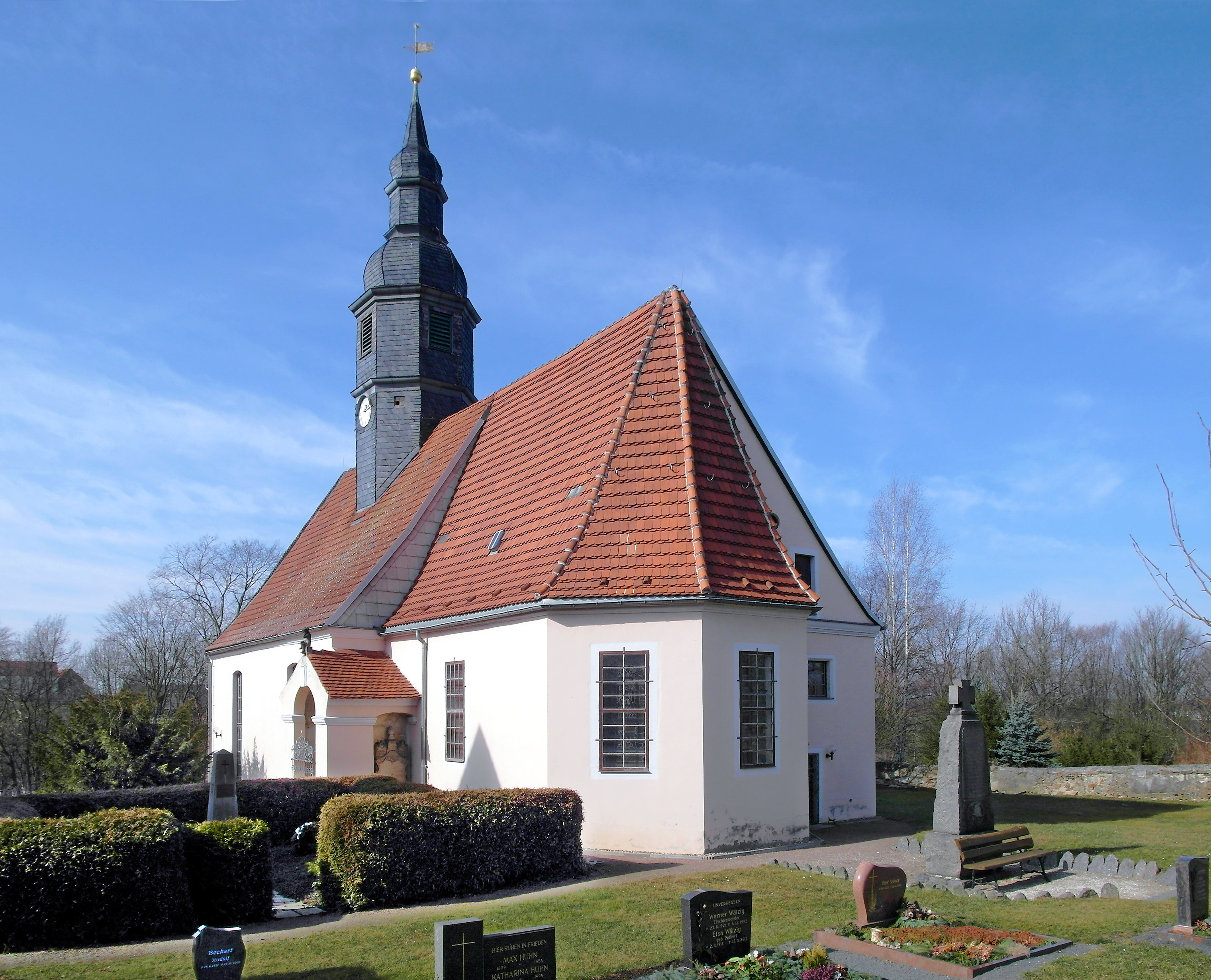 07.03.2015 01683 Tanneberg (Gemeinde Klipphausen): Dorfkirche Tanneberg [SAM8496.JPG]20150307040DR.JPG(c)Blobelt